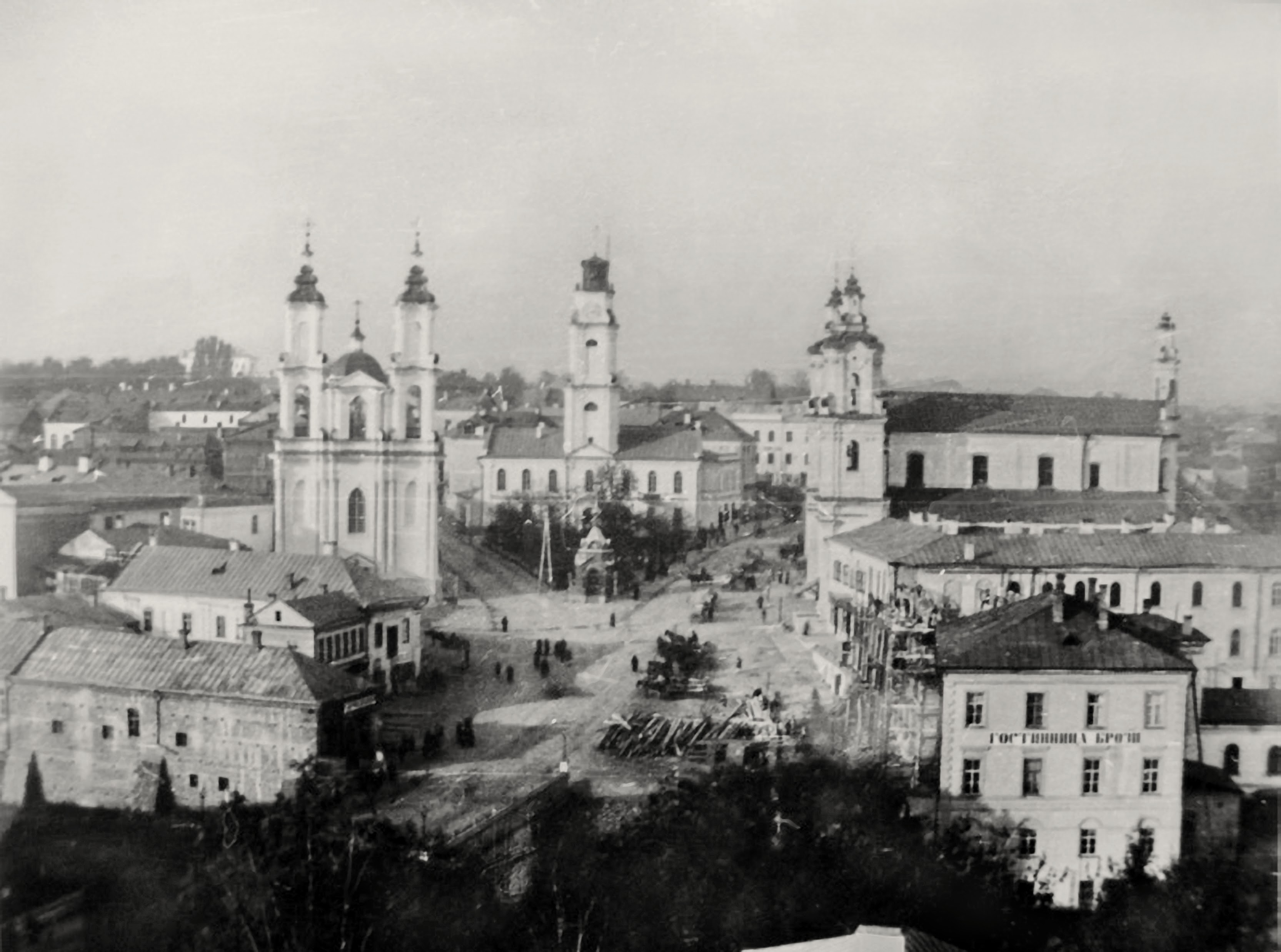 Беларуская (тарашкевіца): Віцебск (Viciebsk), пляц Рынак (plac Rynak)